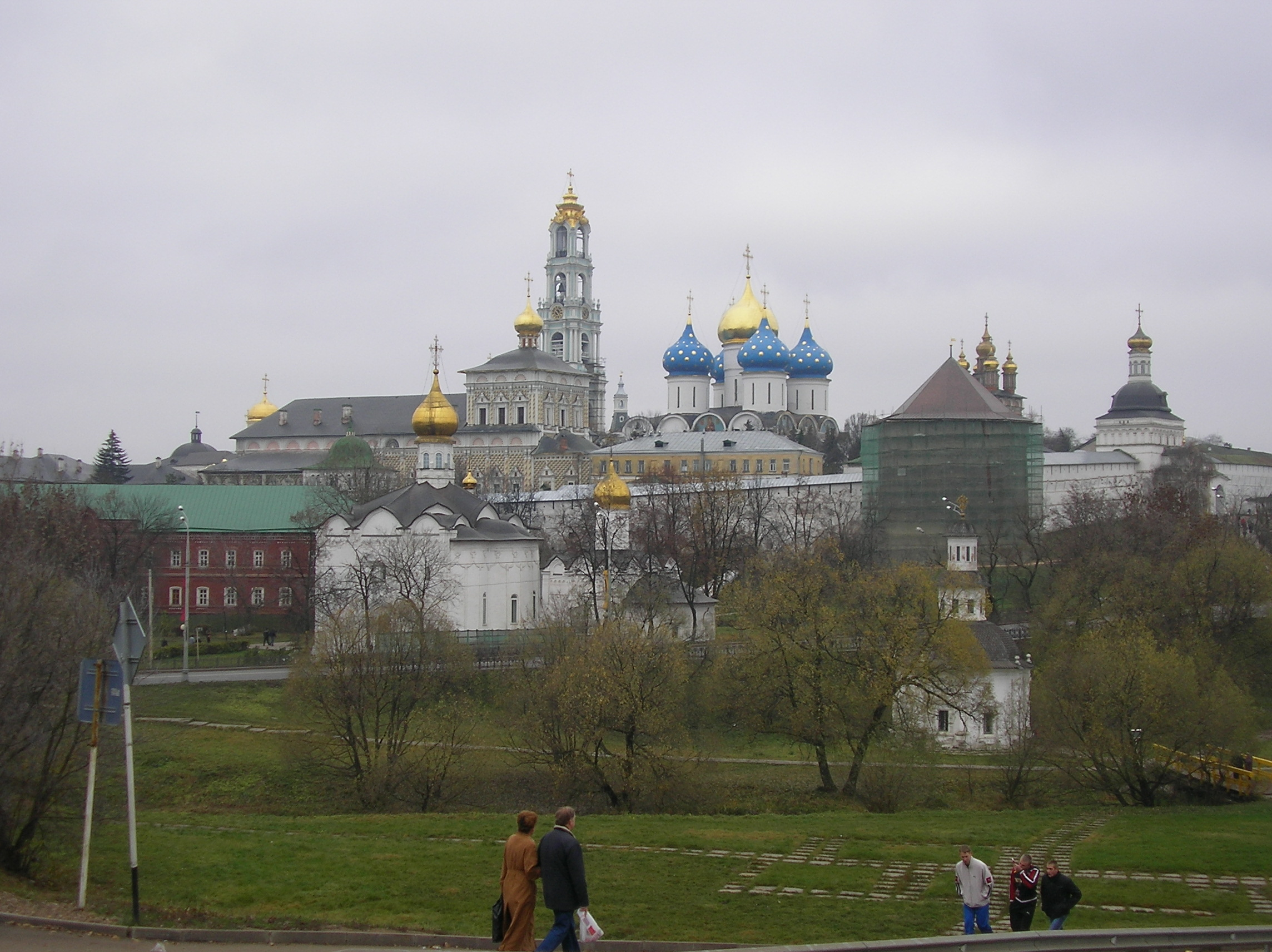 Троице-Сергиева лавра.